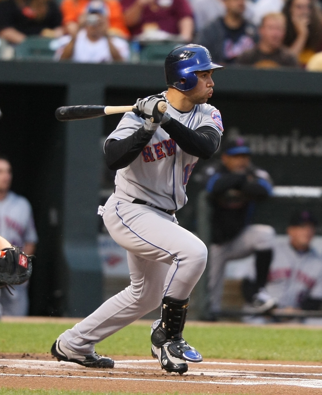 Carlos Beltrán